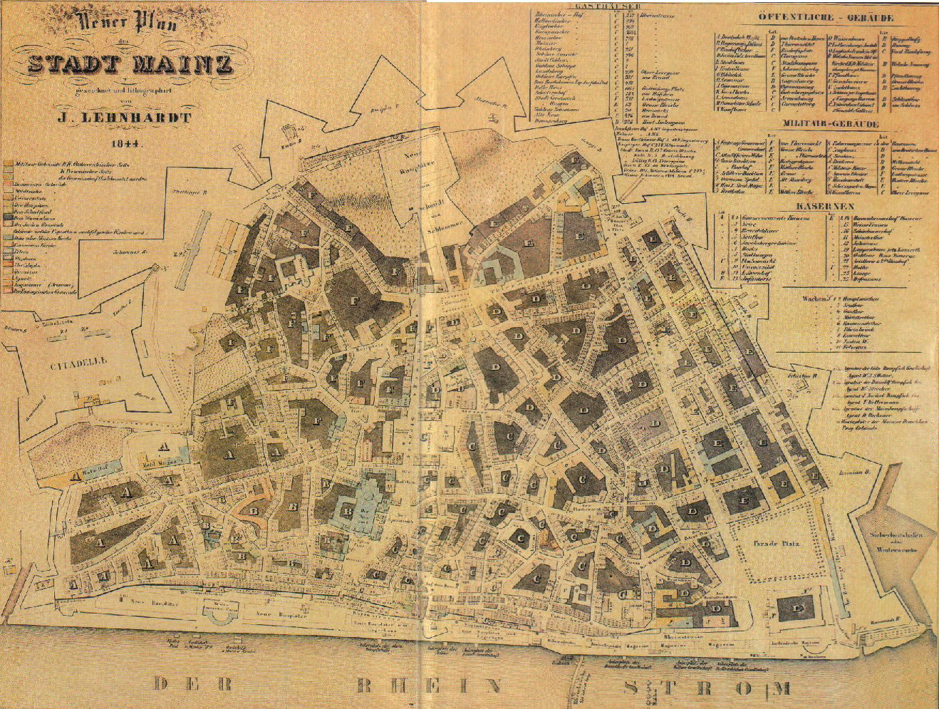 Bild: Karte der Stadt Mainz 1844 von J. Lehnhardt; Quelle: Mainz - Die Geschichte der Stadt, Ph. v. Zabern Verlag 1999; Lizenz: PD, da Reproduktion & Schutzdauer des Originals abgelaufen